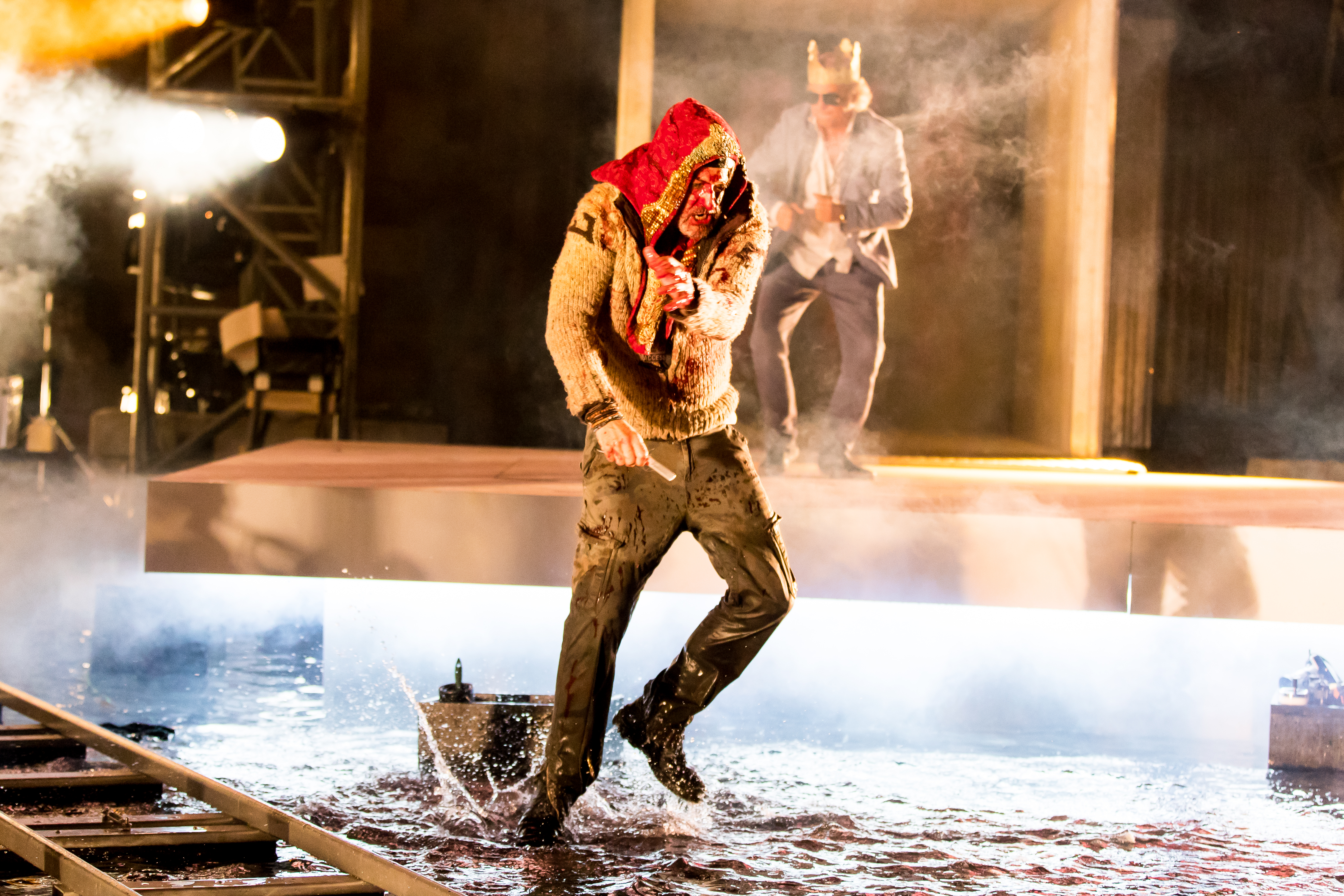 2016: Uraufführung: "GOLD. Der Film der Nibelungen" Regie: Nuran David Calis Autor: Albert Ostermaier Intendant: Nico Hofmann --- Ensemble: Produzent Konstantin Trauer: Uwe Ochsenknecht Regisseur Arsenij Kubik: Vladimir Burlakov Drehbuchautor Charlie P. Weide: Josef Ostendorf Society Reporter Peter Scheumer: Dominic Raacke Kamerafrau "the eye": Anna Rot Setdesignerin "set": Joy Maria Bai Assistentin des Produzenten Carmen: Alexandra Kamp Maskenbildnerin Sueyla Blume : Ayse Bosse die Ältere Kriemhild Karina Bergmann: Katja Weitzenböck die Jüngere Kriemhild Simone Gehel: Constanze Wächter die Ältere Brünhild Lotte Jünger: Michaela Steiger die Jüngere Brünhild Nathalie Aurun: Dennenesch Zoudé Siegfried Mohamad Söder: Ismail Deniz Hagen René Inner: Sascha Göpel Gunther Klaus Castel: Maximilian Laprell Bürgermeister Franz Koppoler: Heiner Lauterbach during Nibelungenfestspiele "GOLD. Der Film der Nibelungen" at Wormser Kaiserdom, Worms, Rheinland Pfalz, Germany on 2016-07-12, Photo: Sven Mandel